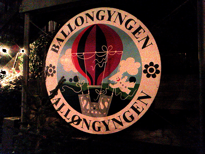 Ballongyngen i Tivoli, København